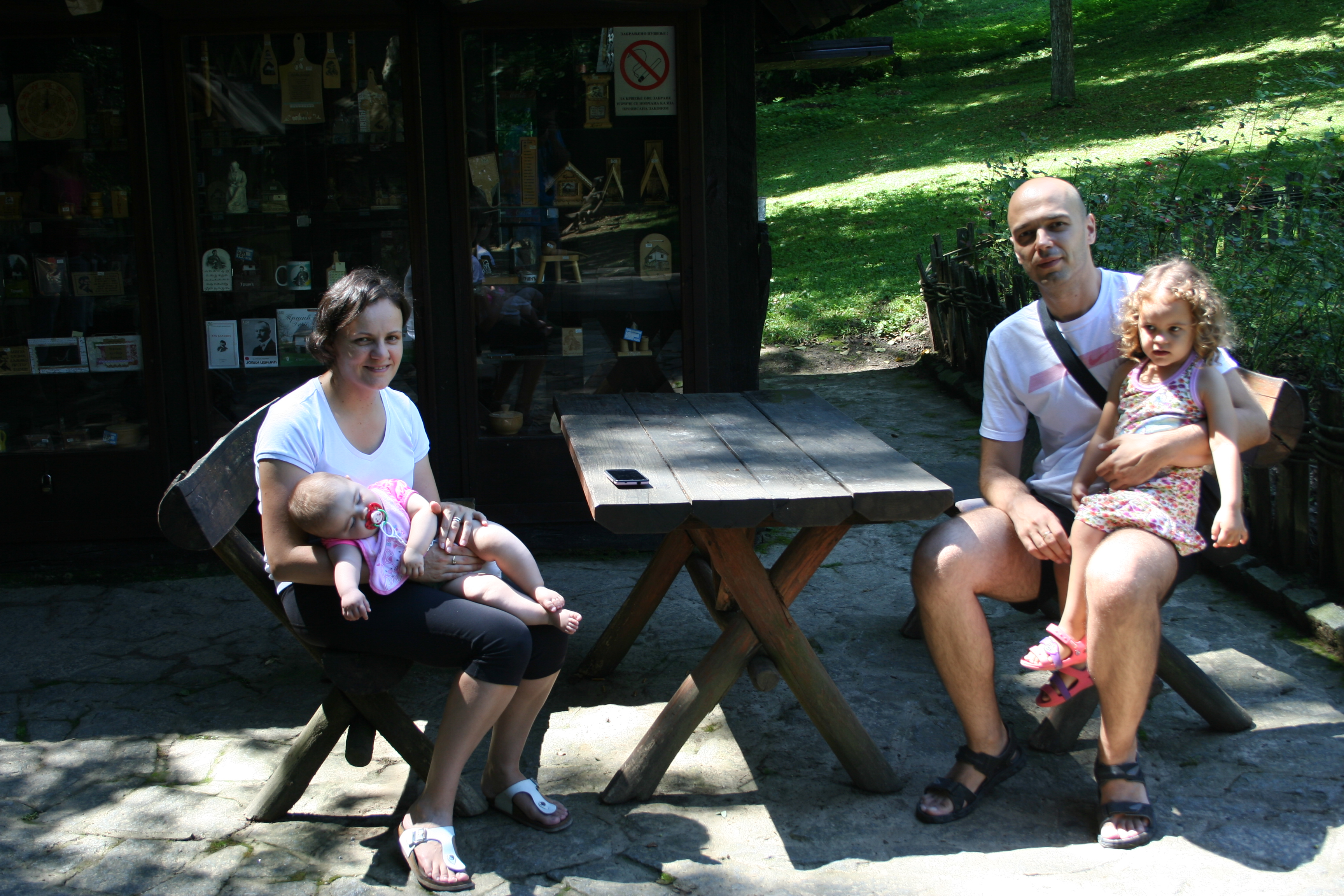 Spomen kuća Vuka Karadžića, Tršić